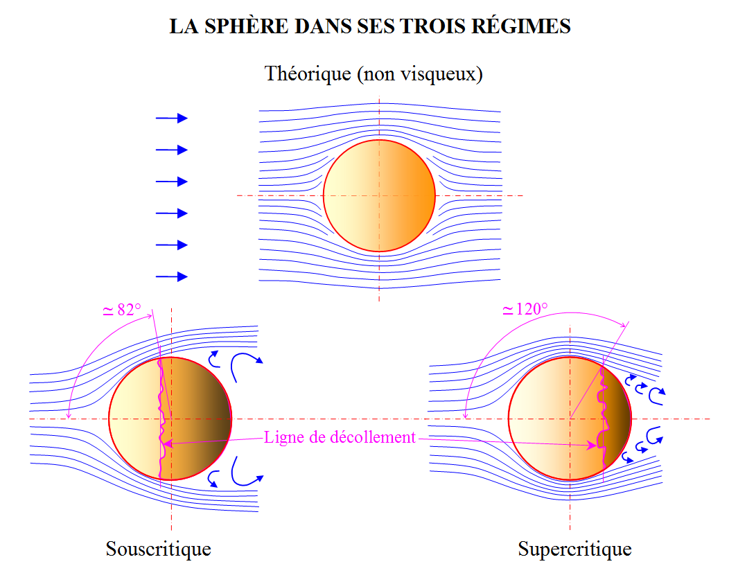 Les deux régimes aérodynamiques de la sphère (souscritique et supercritique) auquel on a ajouté l'écoulement théorique (en non visqueux). Décollement de l'écoulement dans les deux régimes. Crise du Cx de la sphère